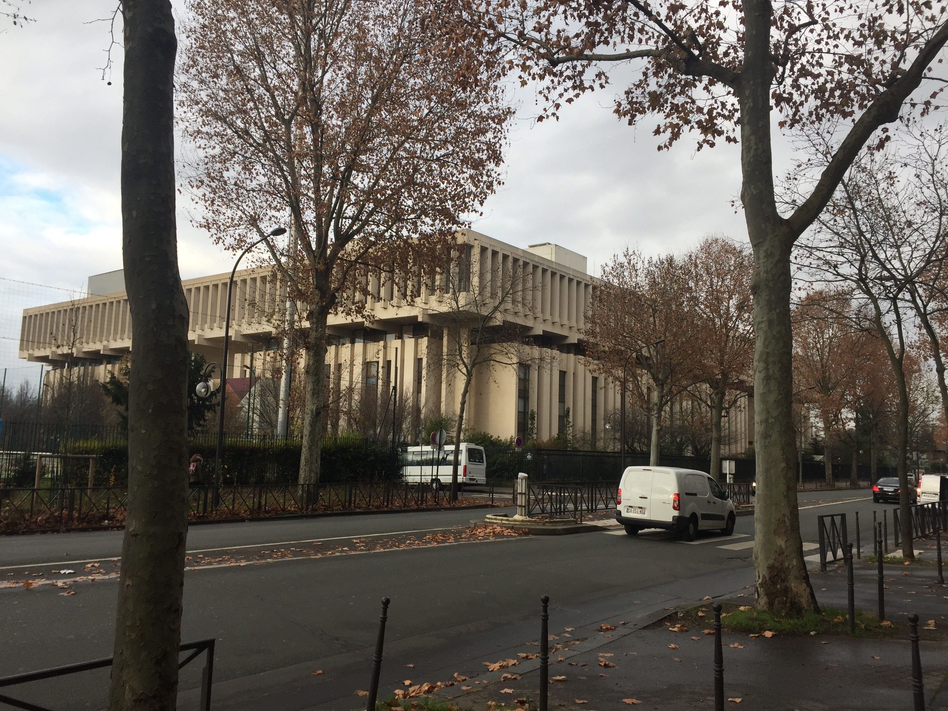 Ambassade de Russie en France en décembre 2016.